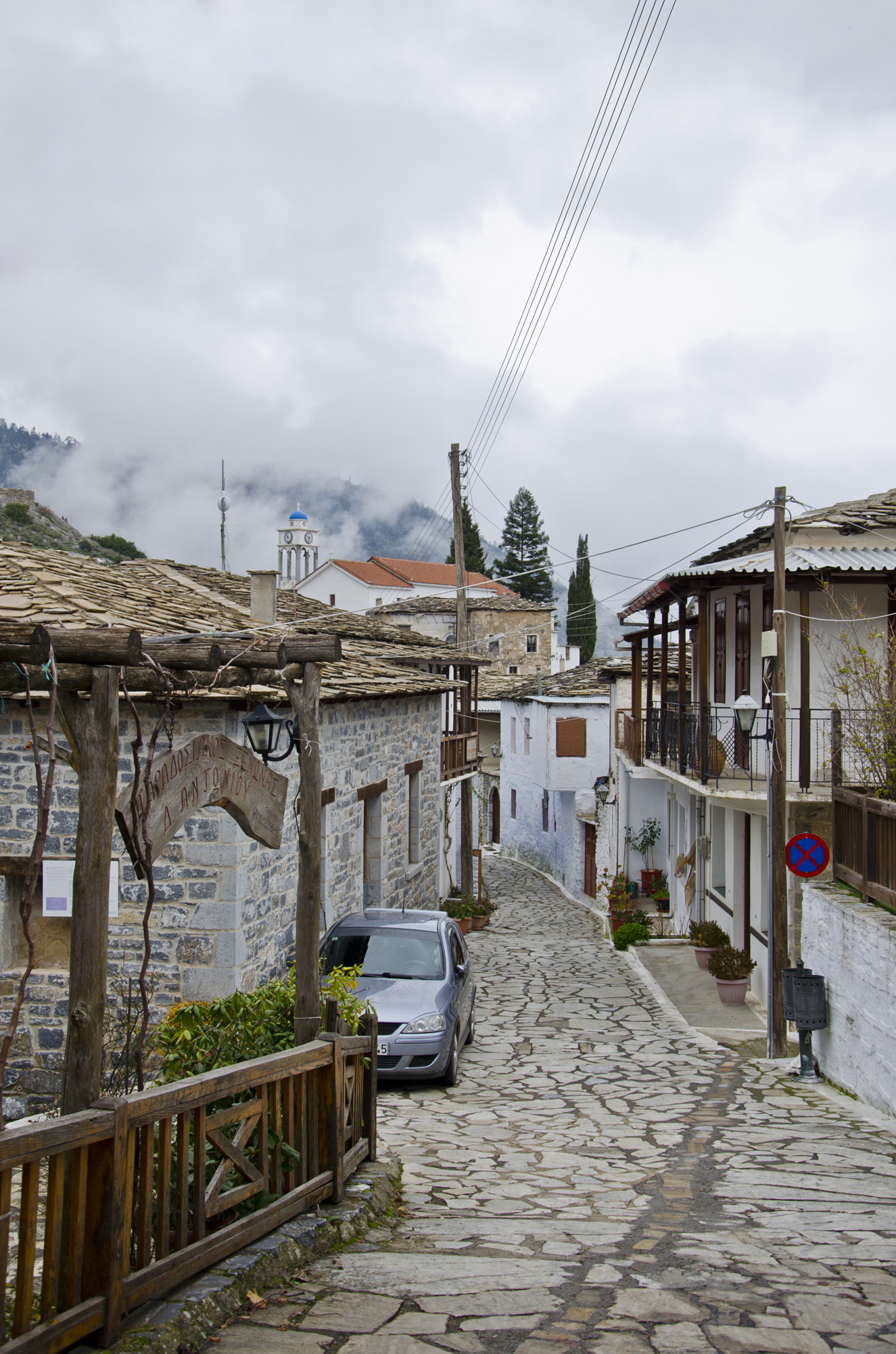 Καστάνιτσα This is a photography of Natura 2000 protected area with ID GR2520006